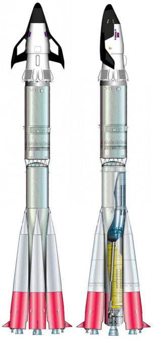 Infografia del Kliper (Клипер) montado en la lanzadera Soyuz 3